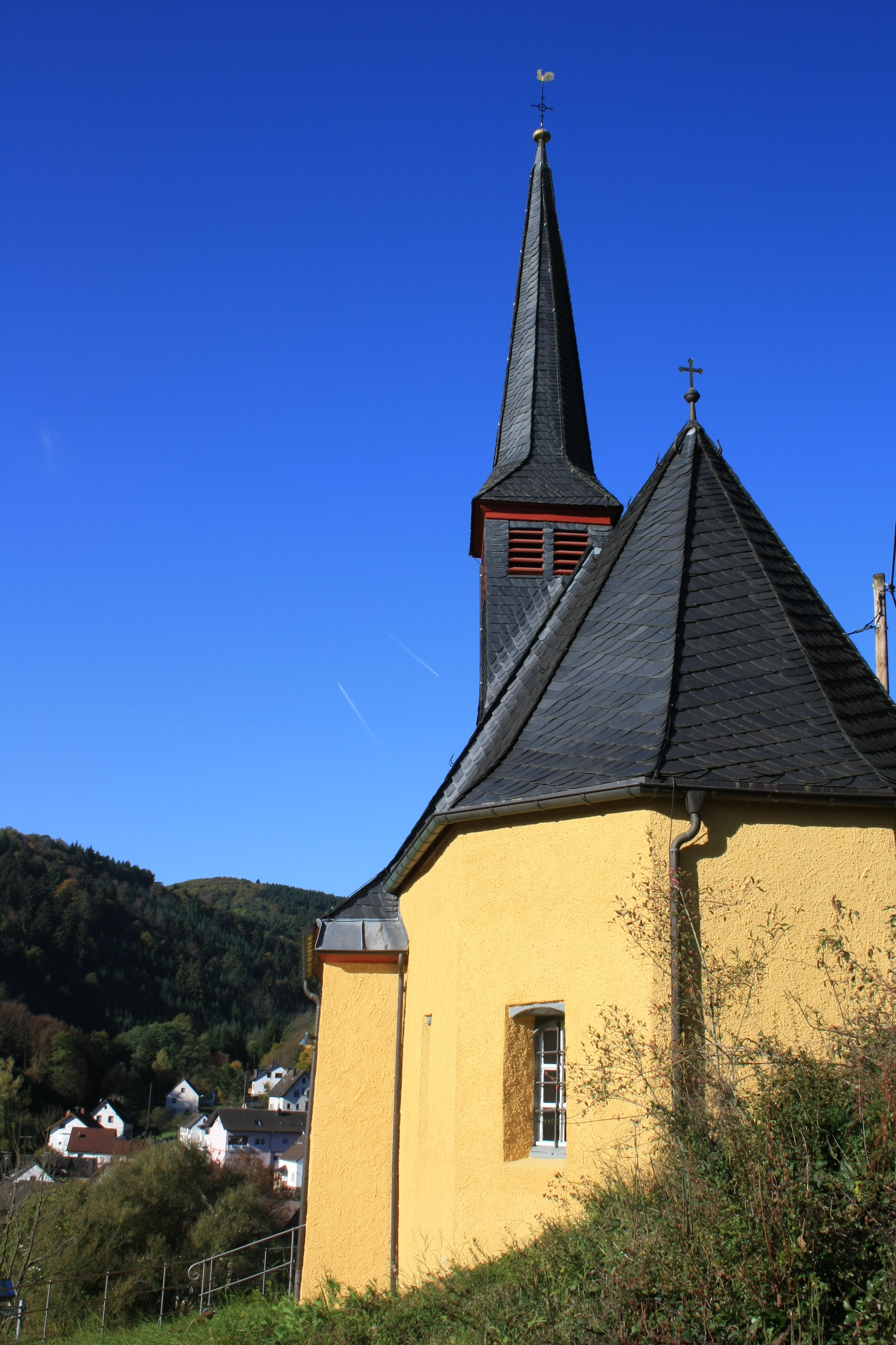 Katharinenkapelle in Ahrbrück, Ansicht mit Chor und Dachreiter